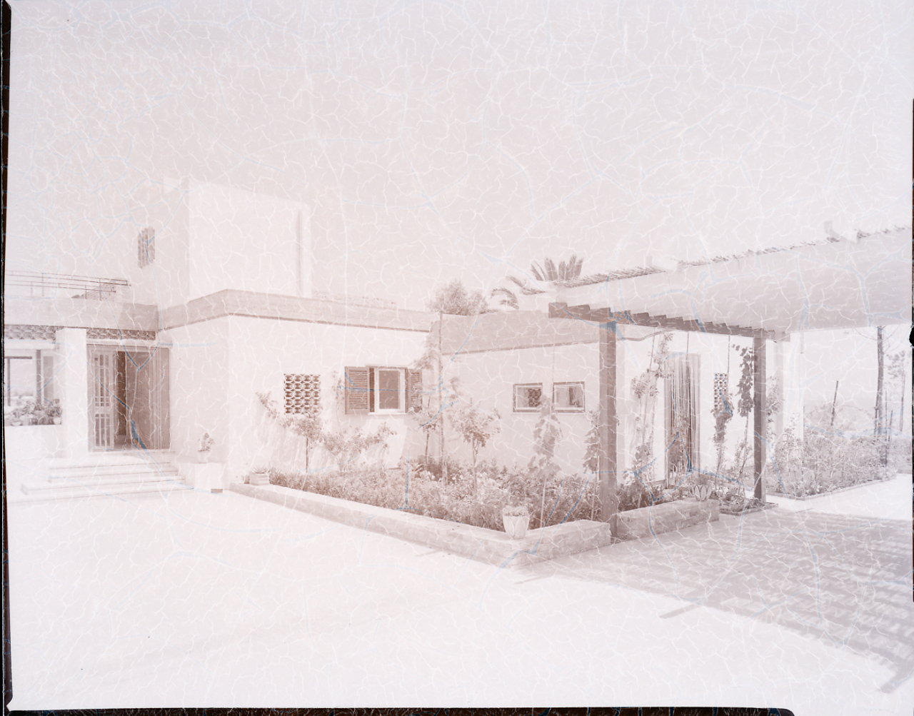 Servizio fotografico : Napoli, 1963 / Paolo Monti. - Buste: 25, Fototipi: 25 : Negativo b/n, gelatina bromuro d'argento/ pellicola ; 10x12. - ((Serie costituita da 25 buste di negativi identificati con una doppia numerazione (da 101 a 123): 4264, 4265, 4266, 4267, 4268, 4269, 4270, 4271, 4272, 4273, 4274, 4275, 4276, 4277, 4278, 4279, 4280, 4281, 4282, 4283, 4284, 4285, 4286, 4287, 4288, e tenute insieme da una graffetta. - Sulla busta identificata con il n. 4264 iscrizione didascalica manoscritta a matita. - Alcuni negativi presentano segni di degrado (gelatina raggrinzita, bollicine e alterazione tonale). - Fonte: Rubrica di Paolo Monti: Archivio 10x12 (ultimi numerati) - dal G1 al (s.d.), presso Archivio Paolo Monti